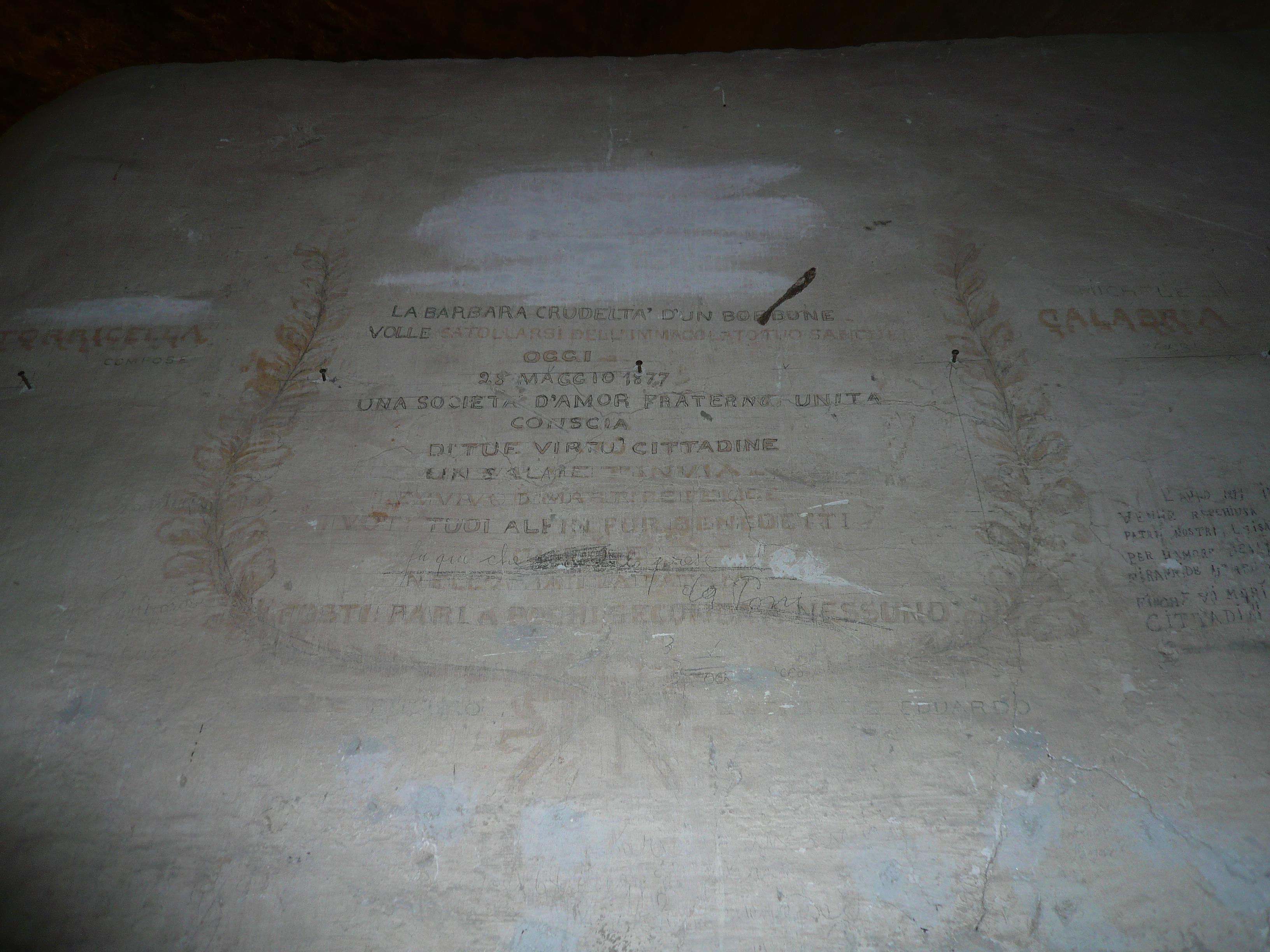 scritte lasciate sulle mura delle celle di Castel Sant'Elmo (Napoli) dai prigionieri che si sono avvicendati nel corso dei secoli, a testimonianza delle loro drammatiche permanenze. Autore foto: Roberto De Martino